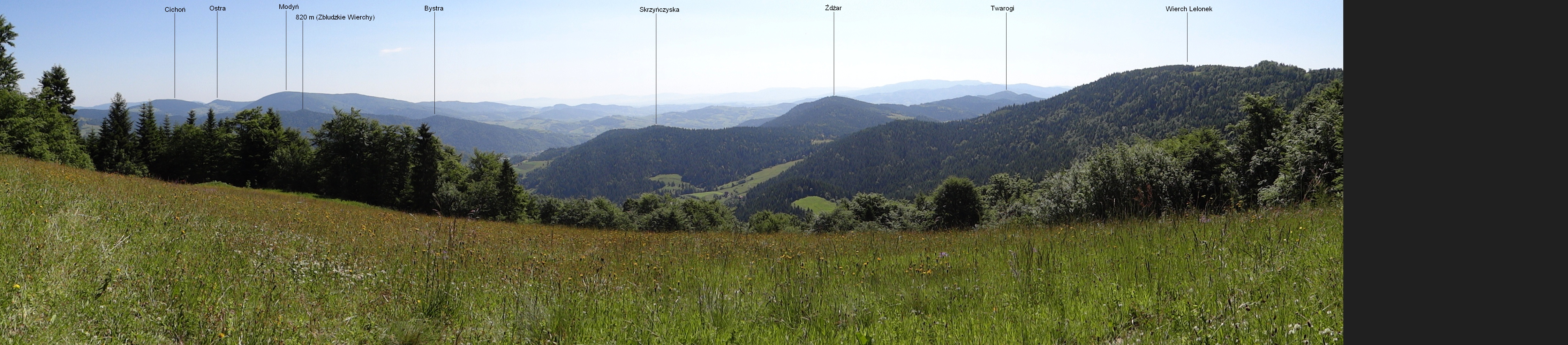 Dolina Zasadnego Potoku w Gorcach